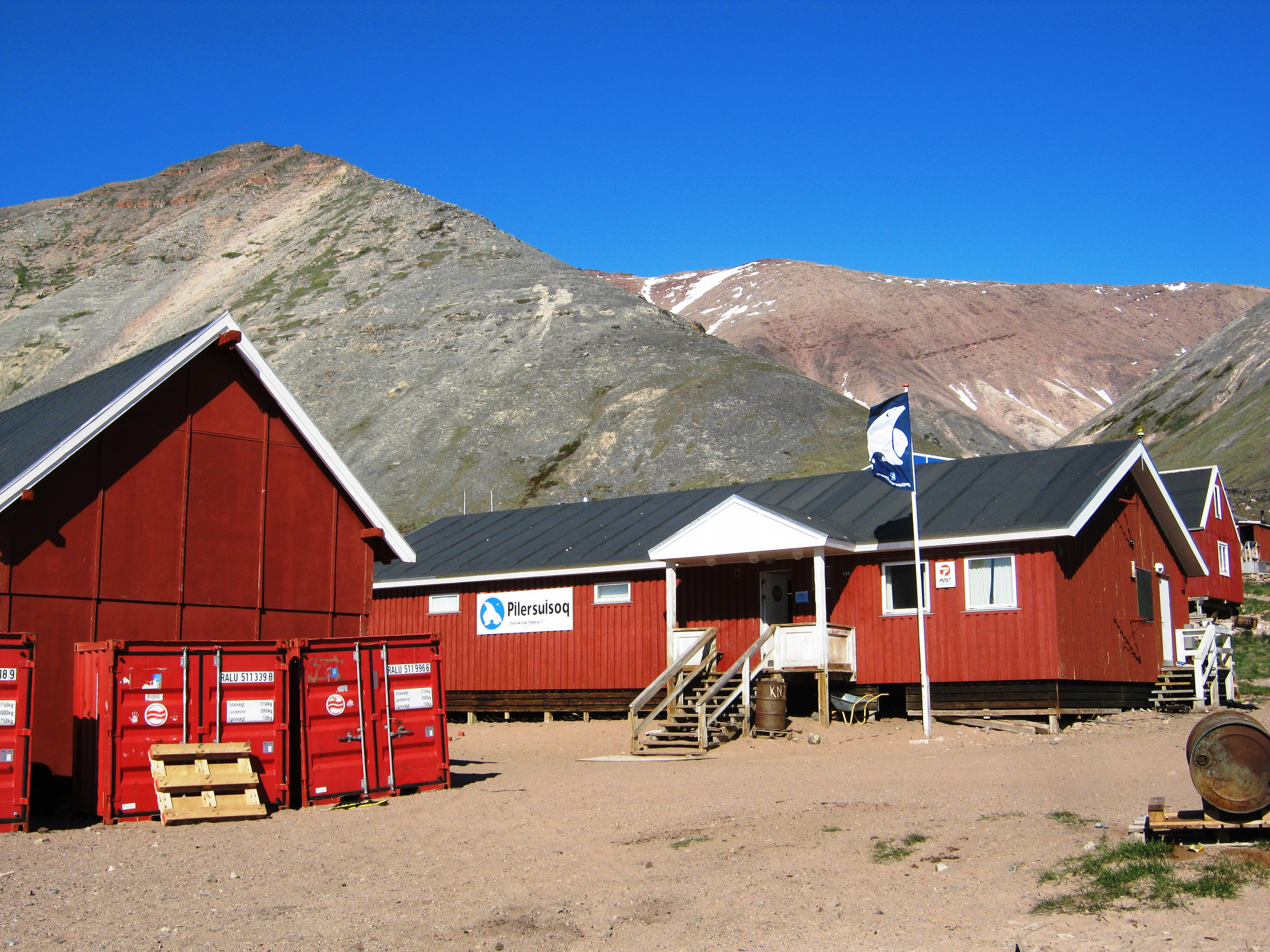 Siorapaluk